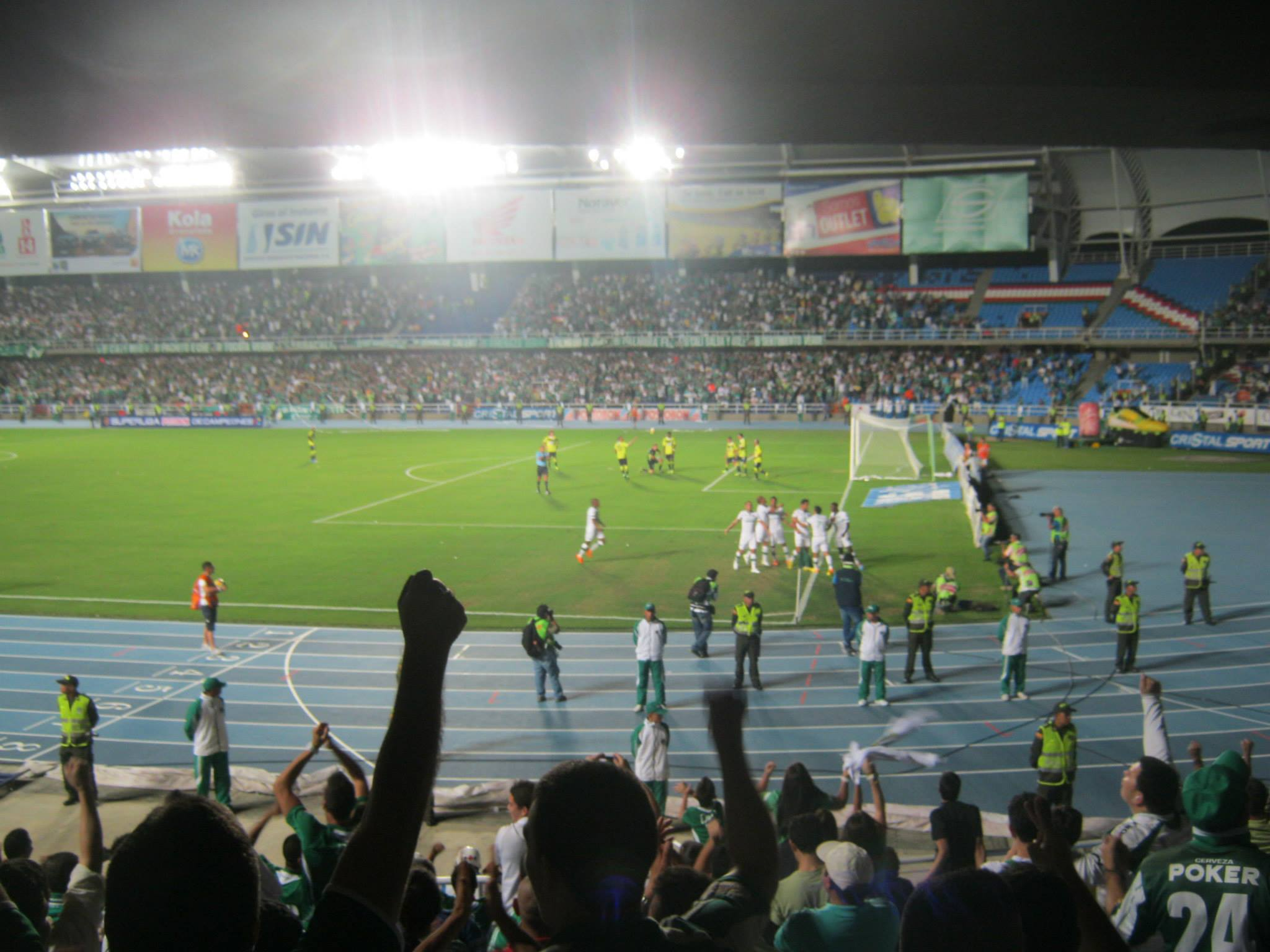 Primer partido de la final de la Superliga de Colombia 2014 entre el Glorioso Deportivo Cali y Atlético Nacional. Copa a la postre ganada por la escuadra caleña.